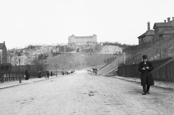 Vanadisvägen österut från Norrtullsgatan. T. v. ligger Matteus skola i f.d. kv. Odin, nu Skalmejblåsaren. I fonden den borgliknande Vanadisreservoaren i Vanadislunden . I bakgrunden syns Vanadislundens andra vattenreservoar.